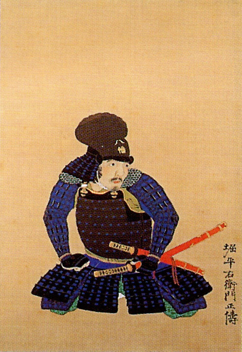 堀定則の肖像。